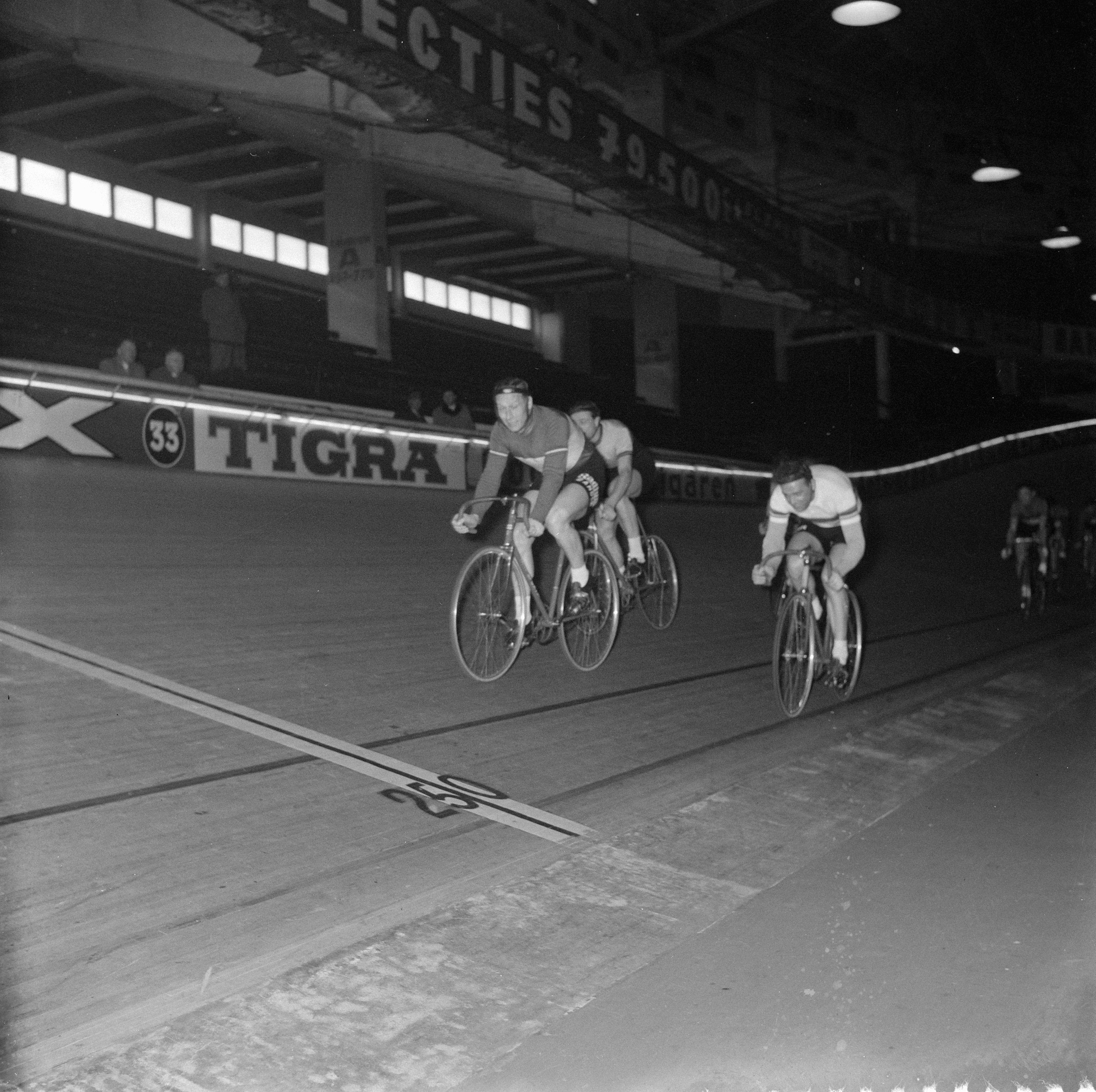 Collectie / Archief : Fotocollectie Anefo Reportage / Serie : [ onbekend ] Beschrijving : Wielerzesdaagse in het sportpaleis te Antwerpen. Van links naar rechts: Jan Derksen (N.), Van Steenbergen (B.) en Lucien Gillen (Lux.) Datum : 20 februari 1958 Locatie : Antwerpen Trefwoorden : wielrennen, wielrenners Persoonsnaam : Derksen, Jan, Gillen, Lucien, Steenbergen, Rik van Instellingsnaam : Wielerzesdaagse Fotograaf : Koch, Eric / Anefo Auteursrechthebbende : Nationaal Archief Materiaalsoort : Negatief (zwart/wit) Nummer archiefinventaris : bekijk toegang 2.24.01.03 Bestanddeelnummer : 909-3571